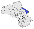 Mapa de la comuna de Bolquera feta a partir d'un mapa de lliure disposició